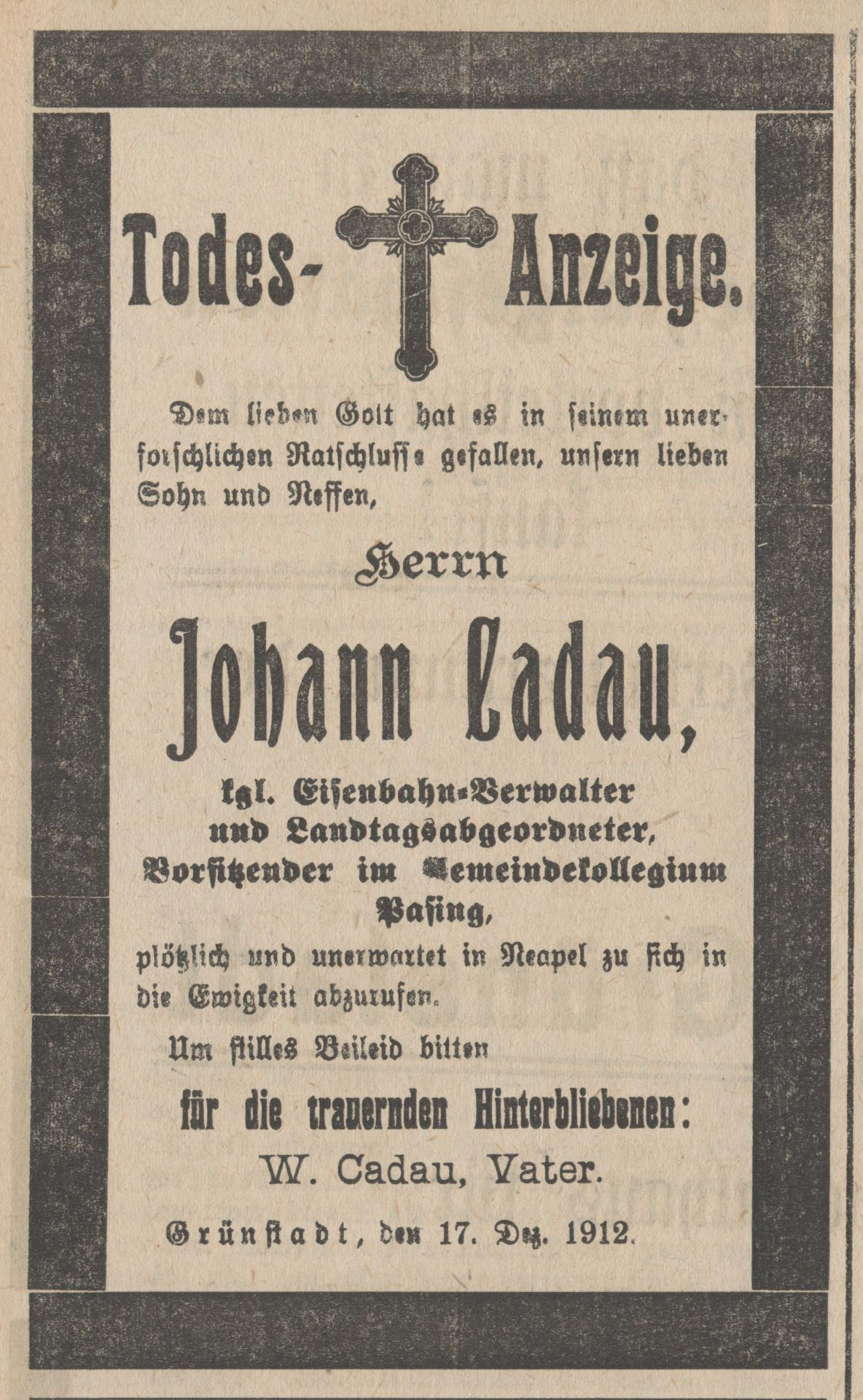 Bay. Landtagsabgeordneter Johann Cadau, Todesanzeige, Grünstadter Zeitung vom 17.12.1912